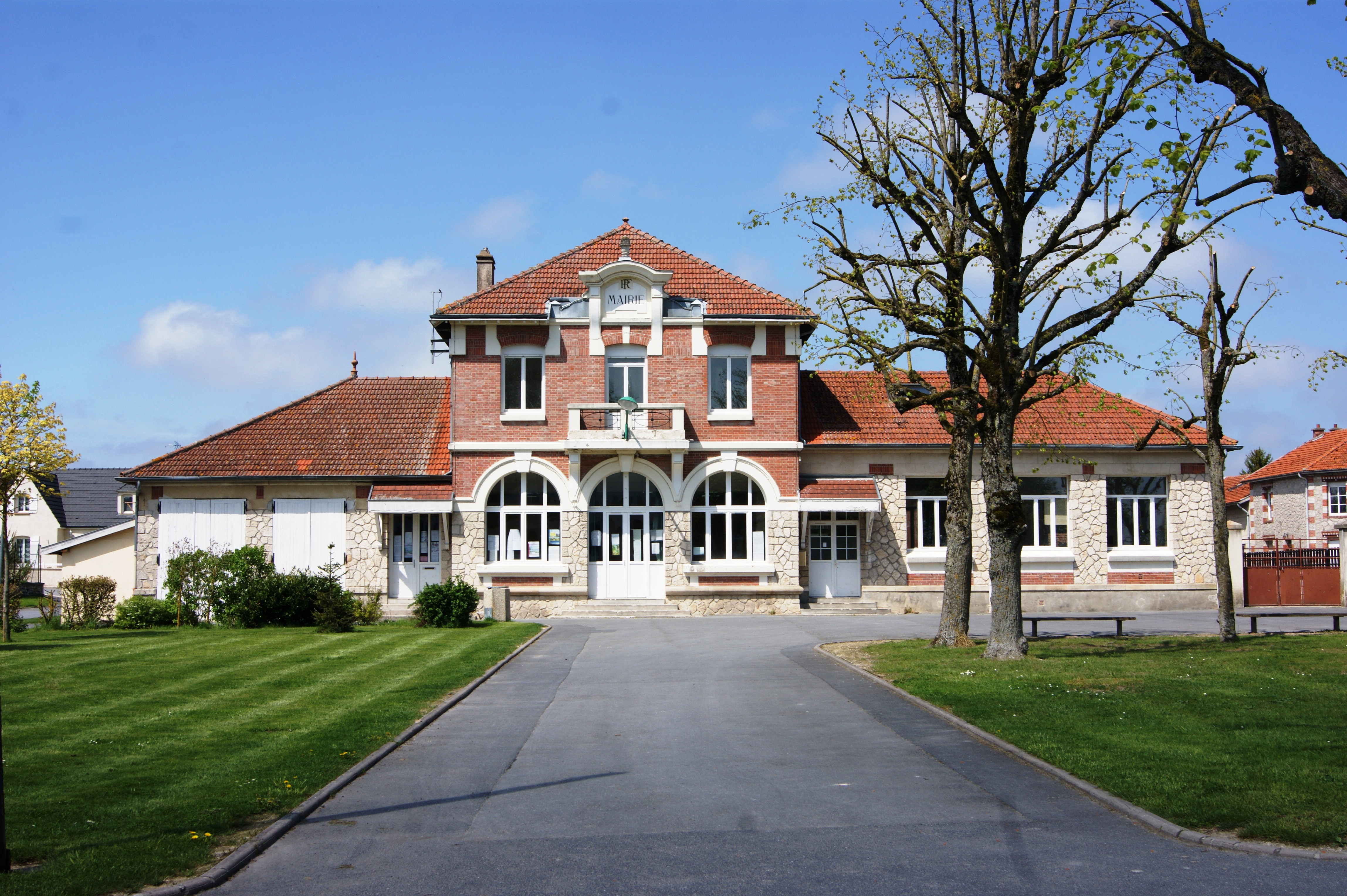 Mairie de Prosnes